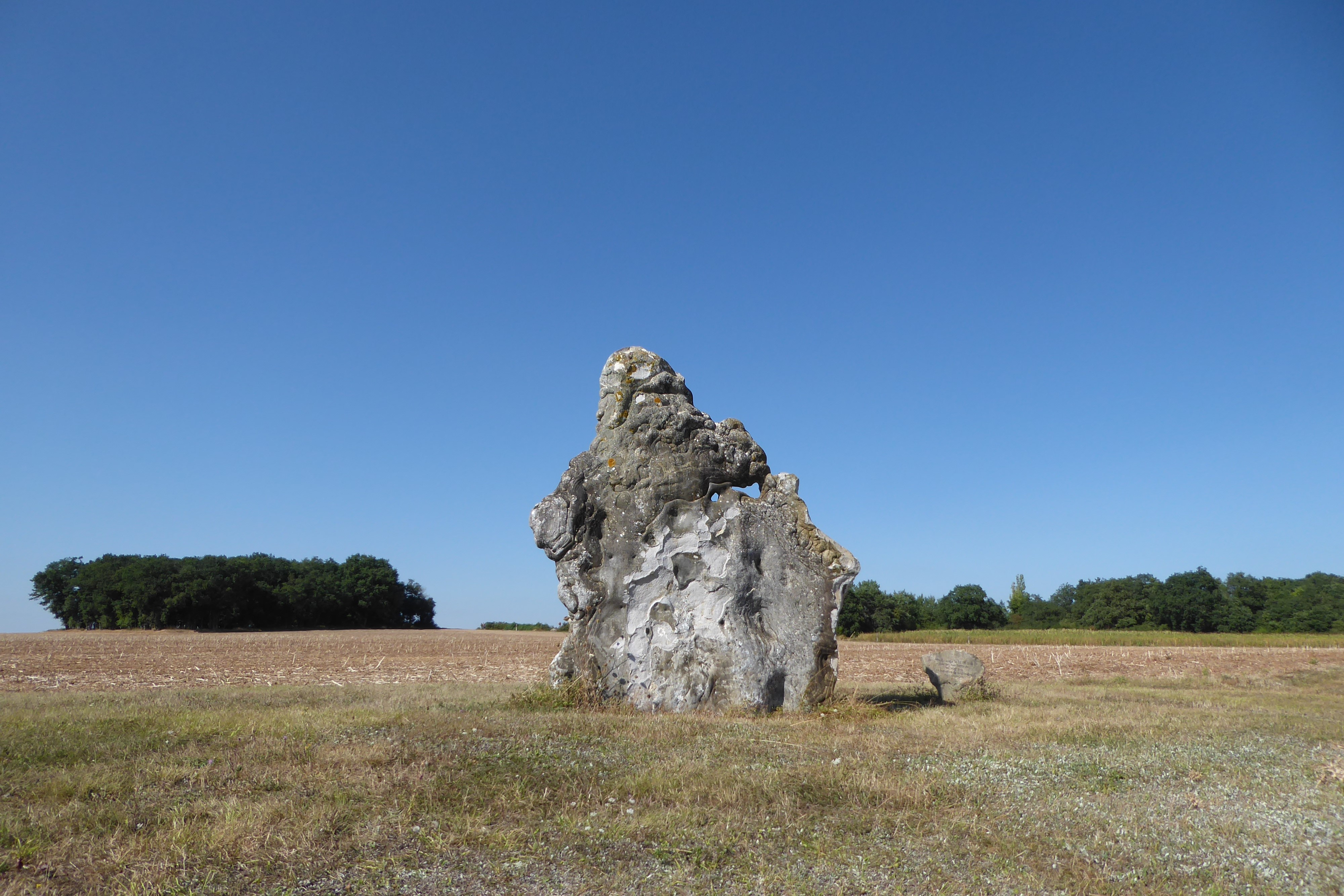 menhir de l'an 2000, érigé par 200 volontaires à Mévoisins, Eure-et-Loir, France. Hauteur : 4,2 mètres, masse : 10 tonnes.